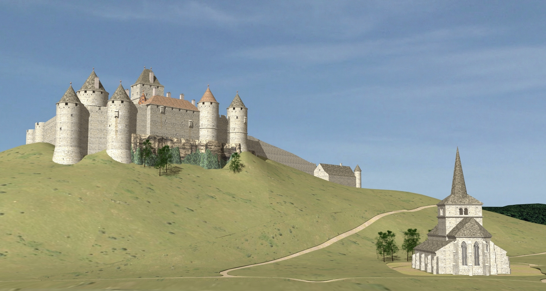 Restitution numérique du château de Chaux basé sur le relevé des fouilles de 2010 à 2015.